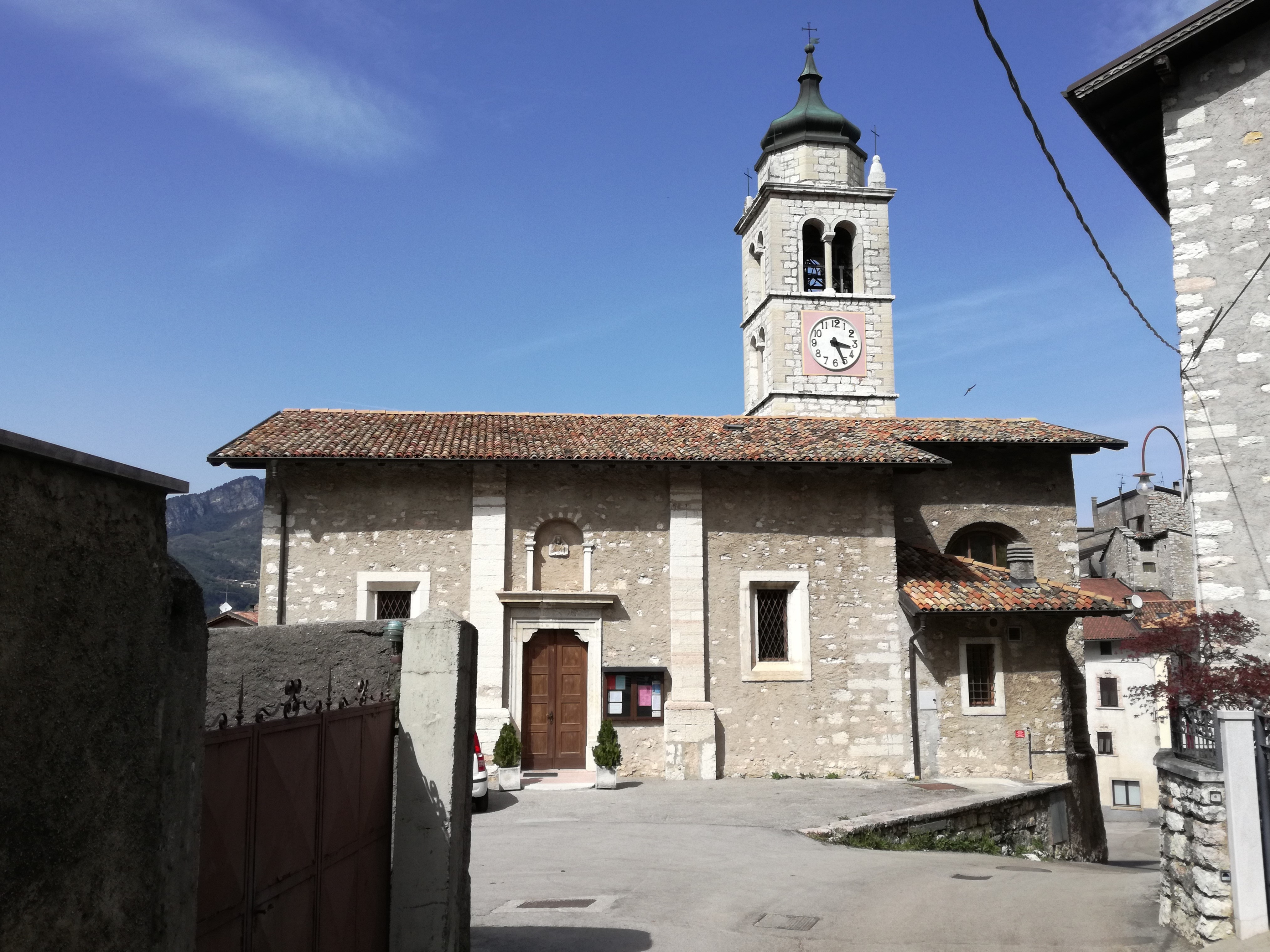 San Clemente - Castione Trentino Italien